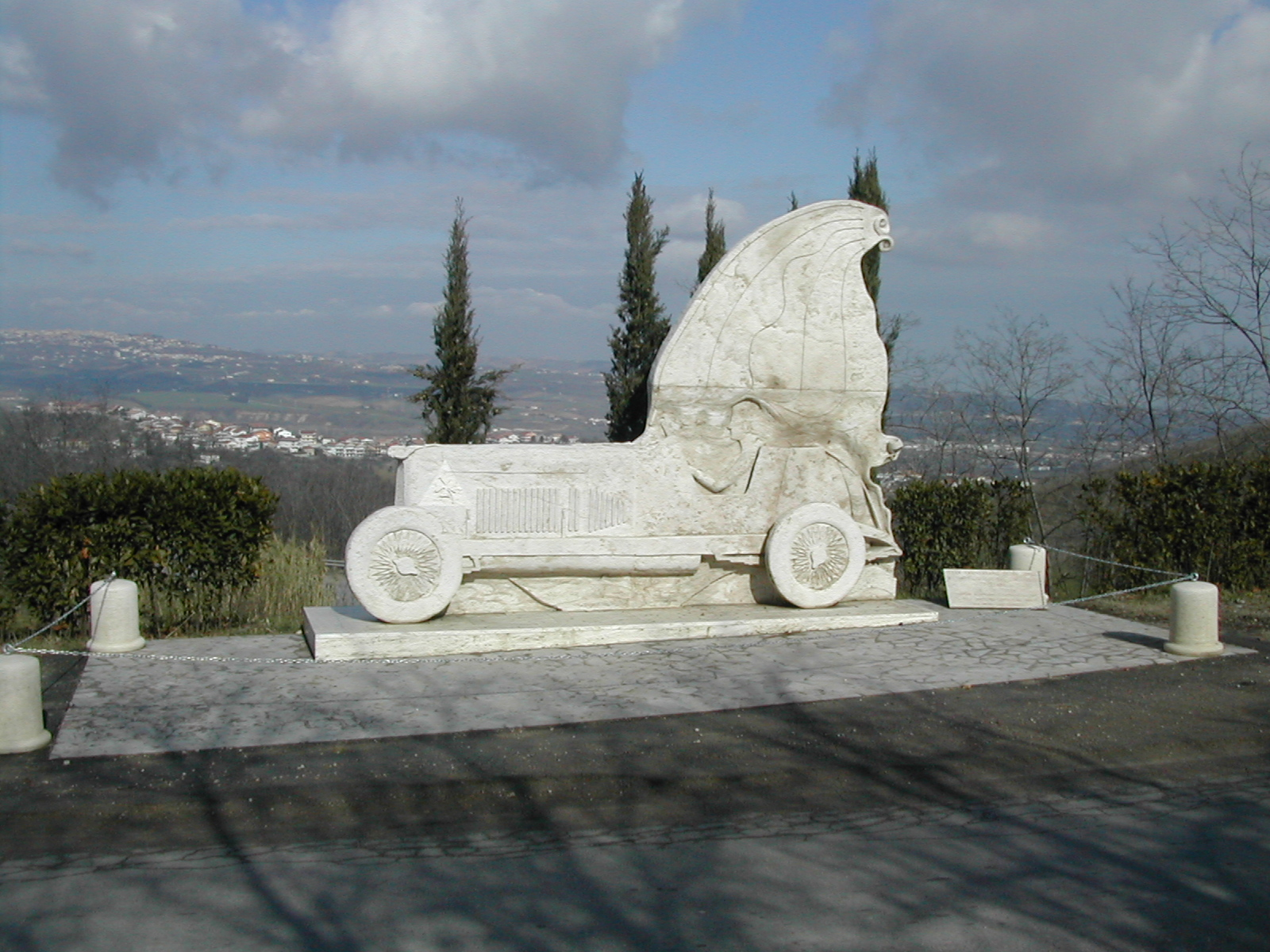 Scultura ricordo della Coppa Acerbo realizzata da Igor Cascella